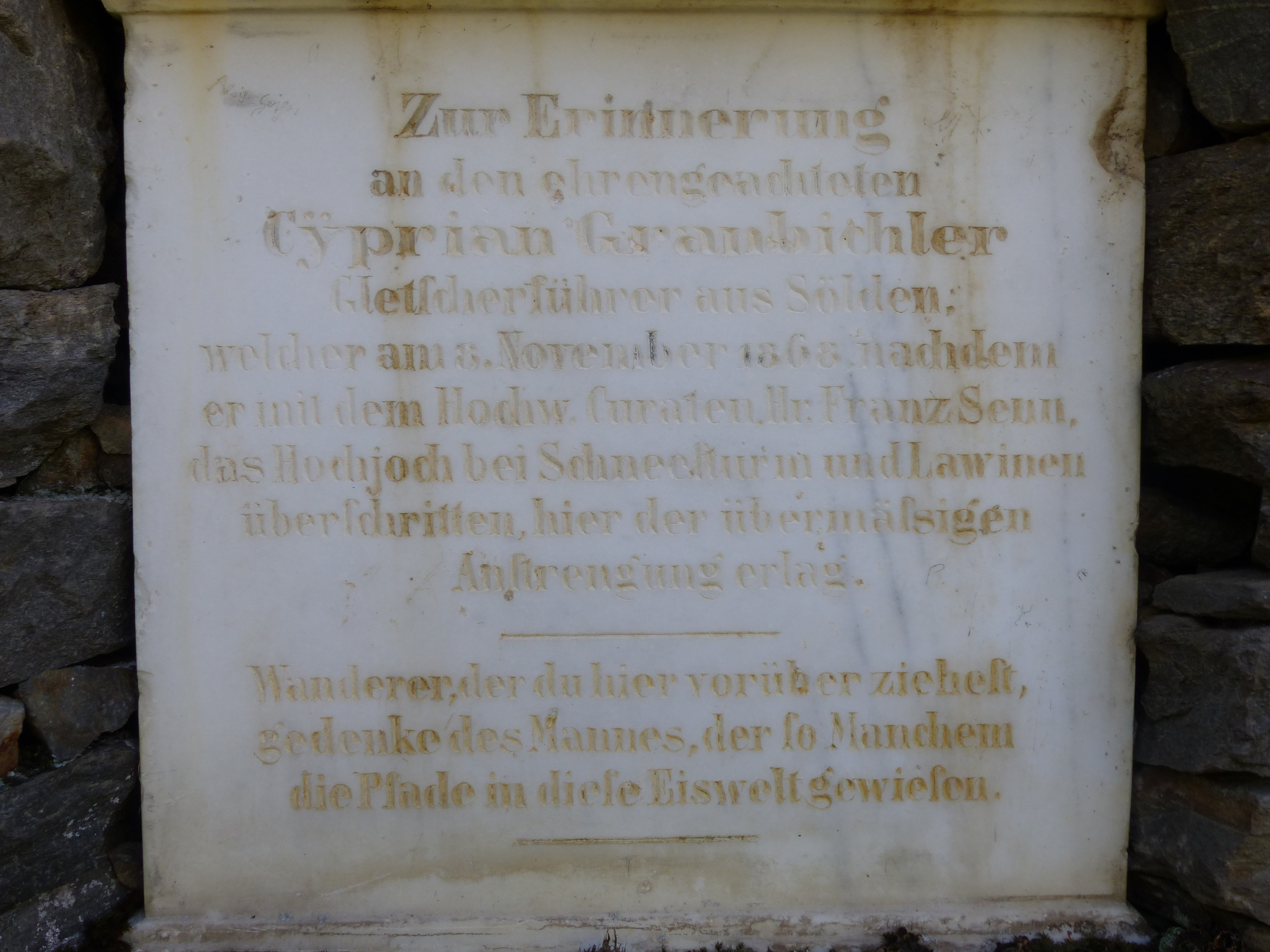 1869 errichtetes Denkmal für Cyprian Granbichler am Sterbeort. Inschrift: "Zur Erinnerung an den ehrengeachteten Cyprian Granbichler, Gletscherführer aus Sölden, welcher am 8. November 1868, nachdem er mit dem Hochw. Curaten Hr. Franz Senn das Hochjoch bei Schneesturm und Lawinen überschritten, hier der übermäßigen Anstrengung erlag - Wanderer, der Du hier vorüber ziehest Wanderer, gedenke des Mannes, der so Manchem die Pfade dieser Eiswelt gewiesen."